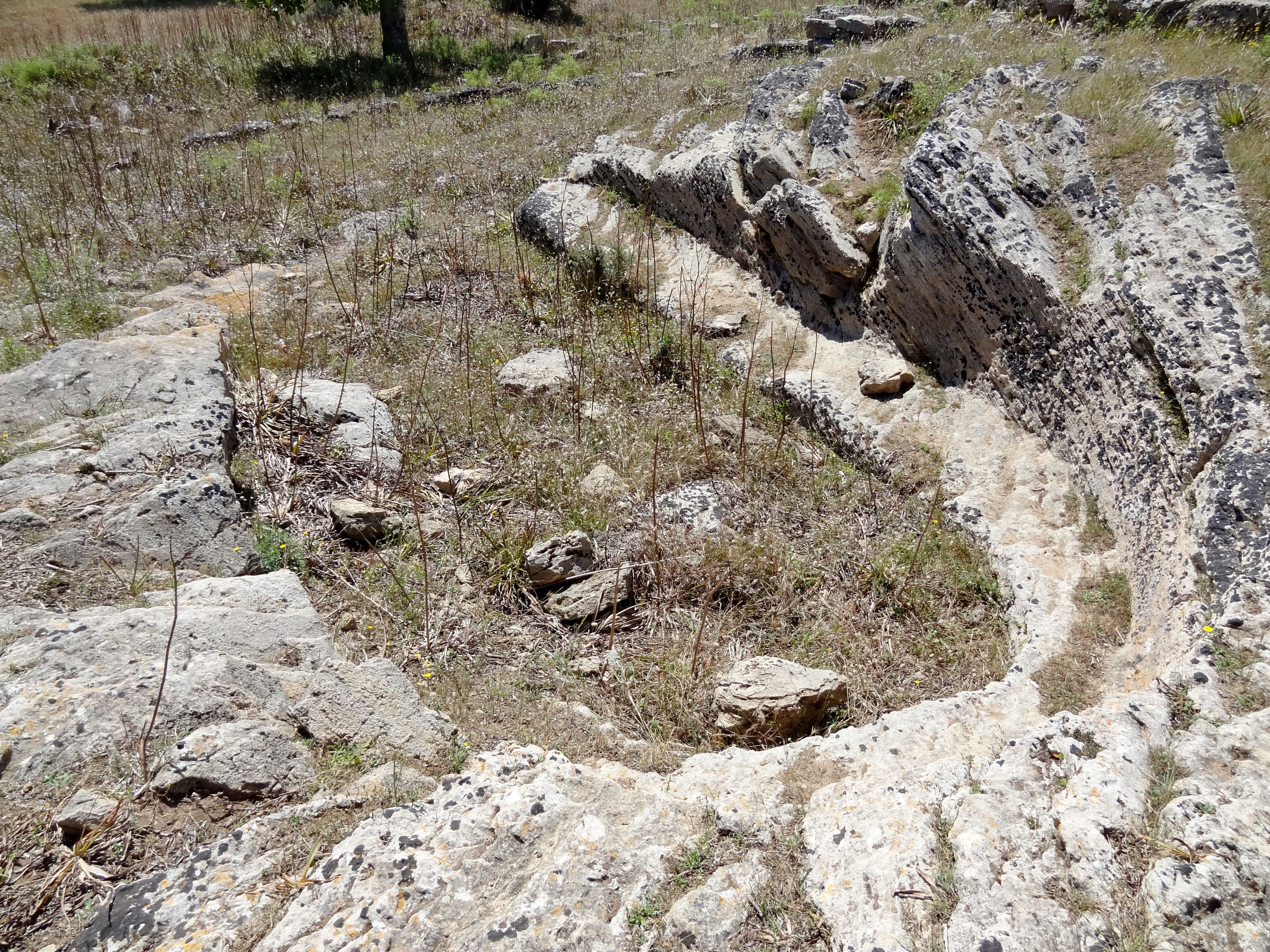 Es Figueral de Son Real, Gemeinde Santa Margalida, Mallorca, Spanien